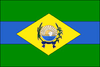 Bandeira de Alto Horizonte, Goiás, Brasil.